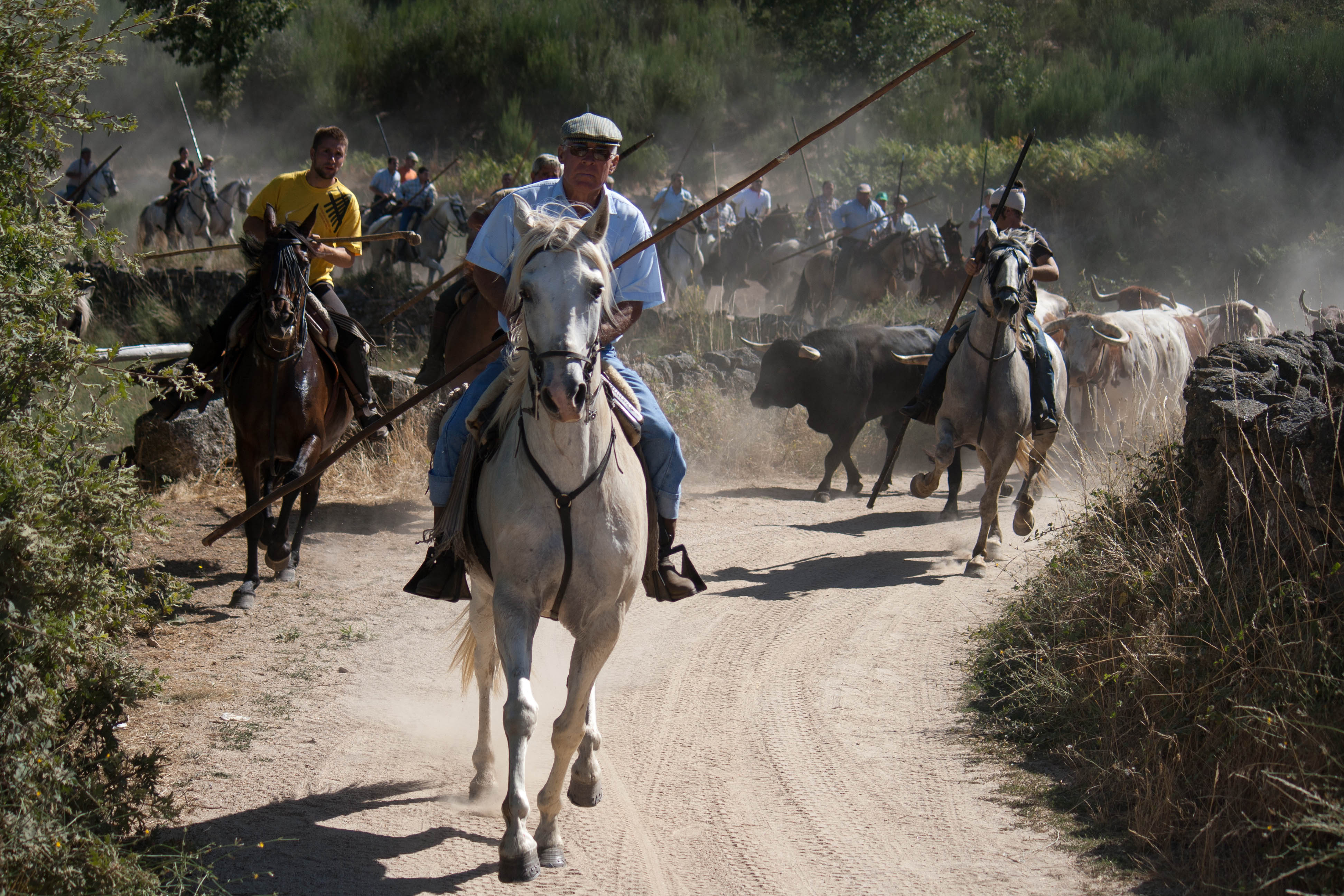 Aldeia Velha, Sabugal Capeia 2012